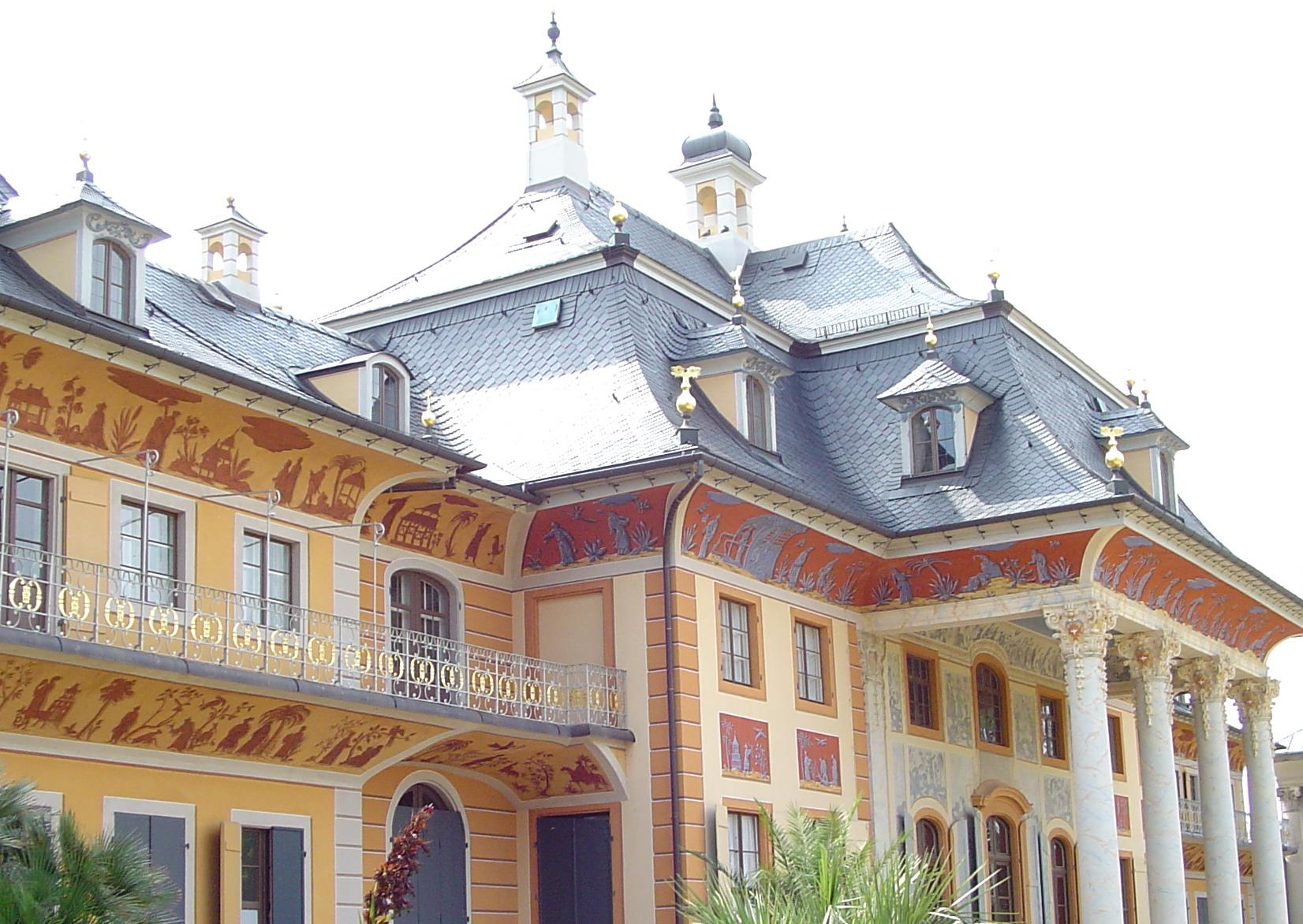 Schloss Pillnitz bei Dresden (Saxony, Germany) typisches Beispiel der Chinamode Source: taken by user:Kolossos, 04.07.2005 Modified by user:Dr. Meierhofer, 26.08.2006